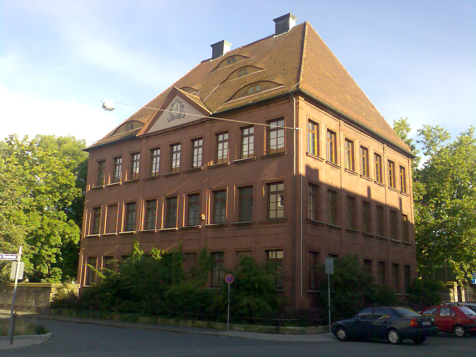 Herrensitz in Nürnberg Glockenhof - Grundherrn-Schloss